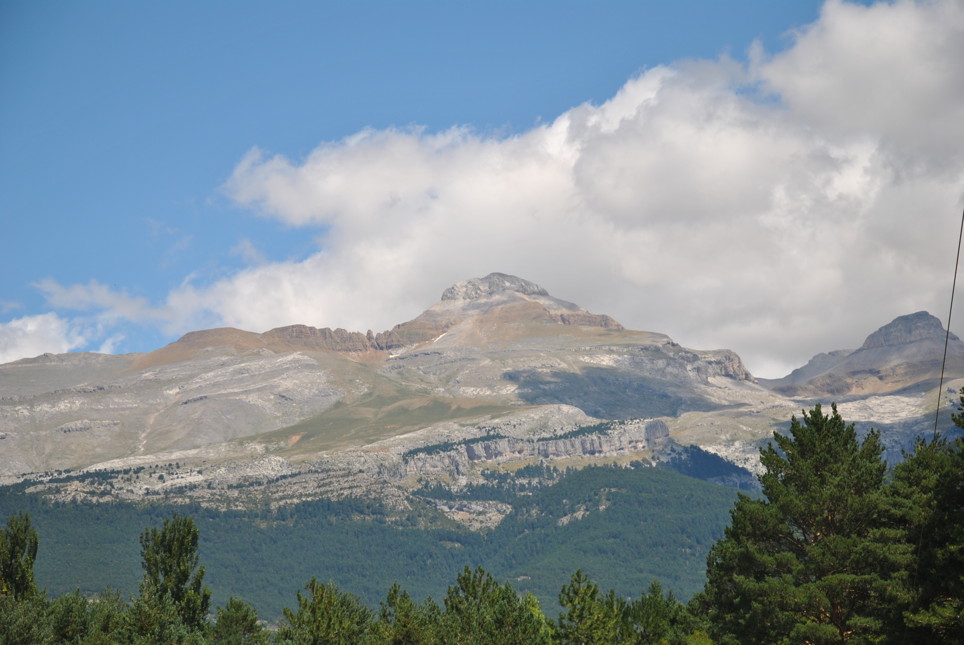 Vista del pico collarada desde Villanua